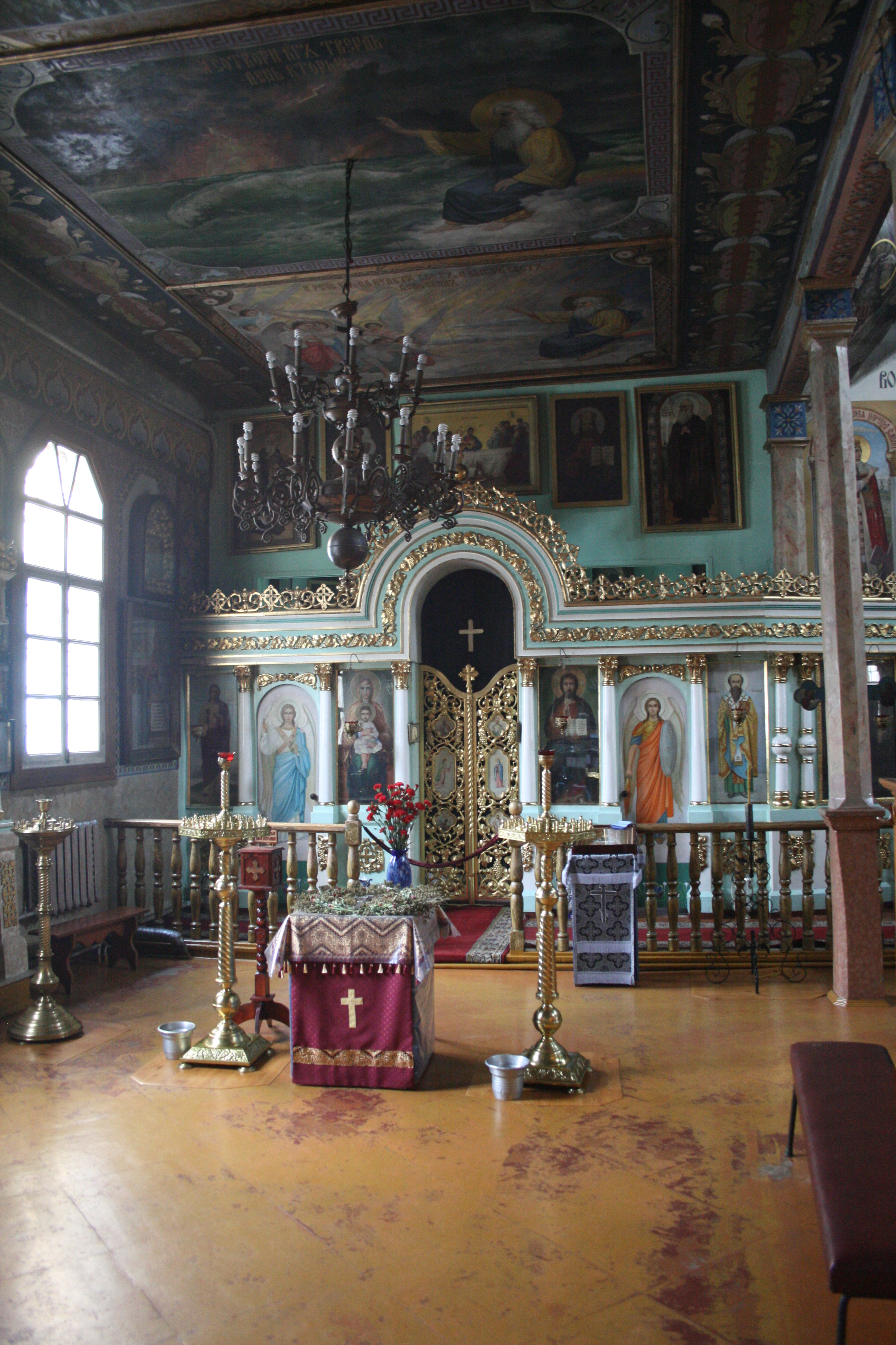 м.Київ, 40-річчя Жовтня пр., 54, Вознесенська церква (Деміївка), интер'єр